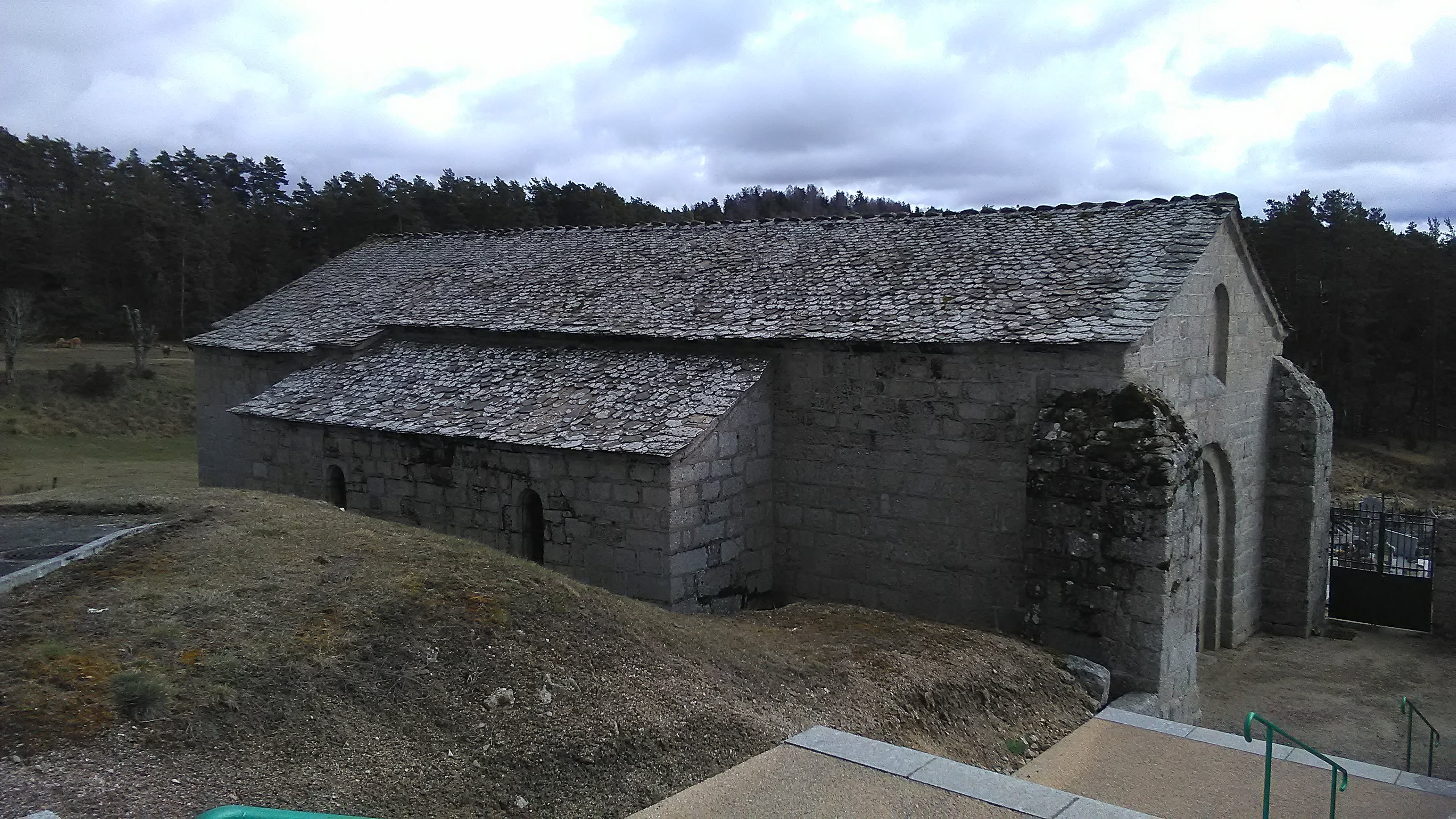 Église Saint-Jean, commune de Serverette, dans la Lozère.